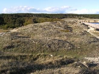 Vue de l'ouvrage défensif au nord du site archéologique de l'Arquet. Axe de la photo : du sud vers le nord.